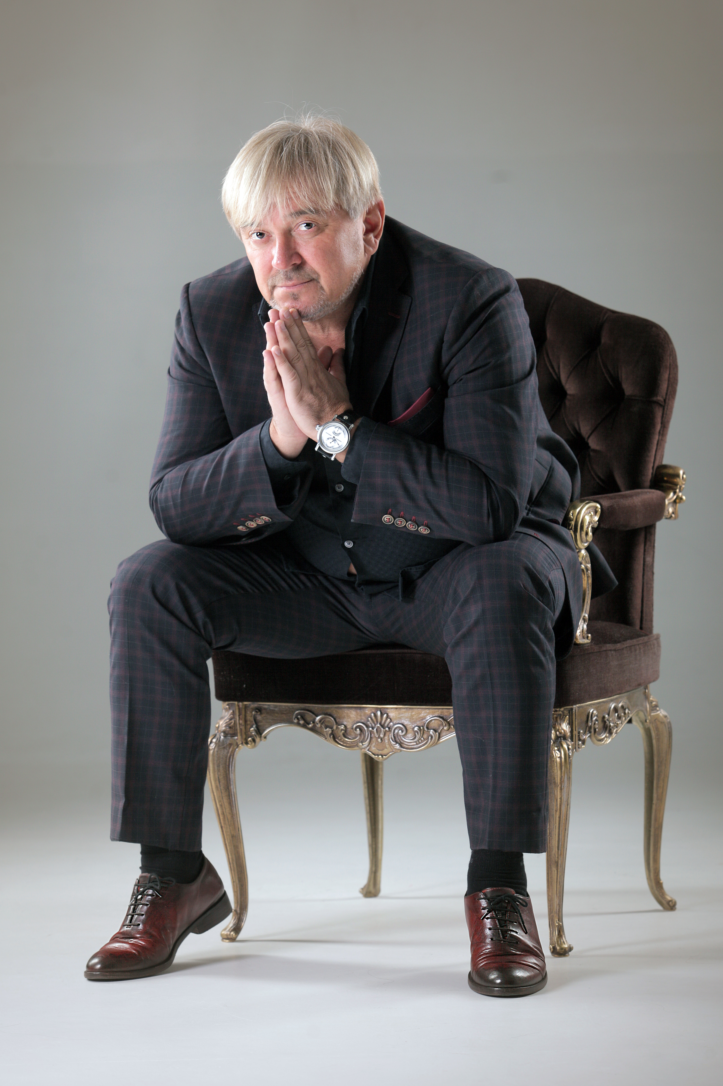 Михайло Грицкан